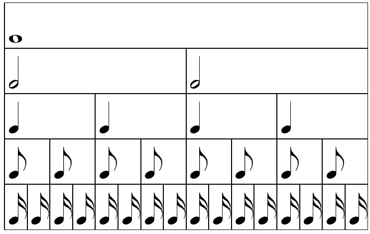 Description : Valeur relative des figures de notes Source : Personnelle Licence : GFDL